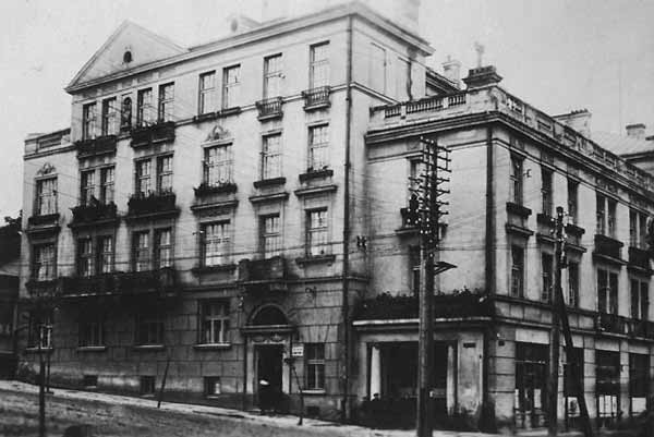 Фото из архива Молчадской.